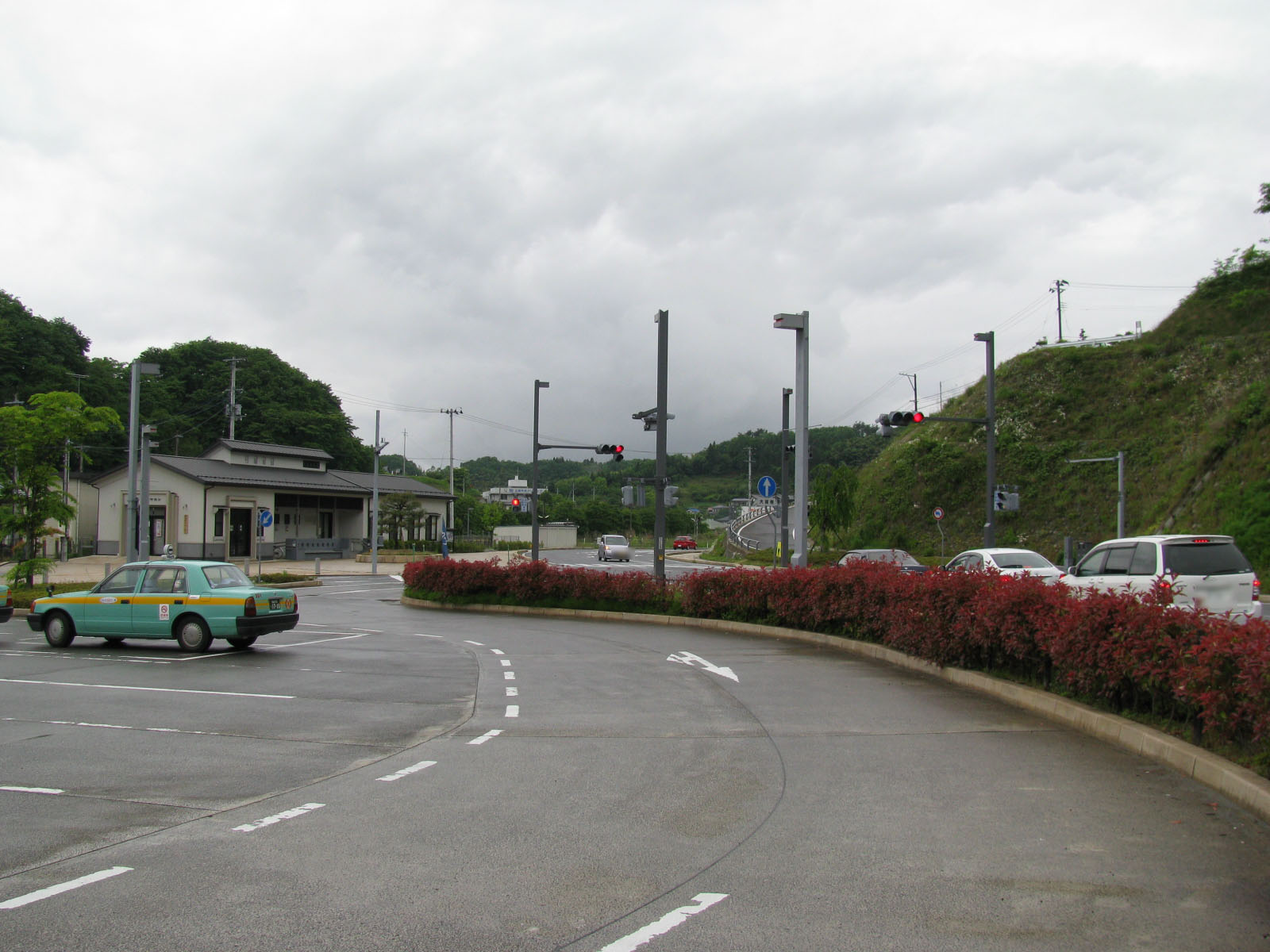 磐越東線三春駅